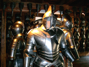 Ritterrüstung im Grazer Zeughaus